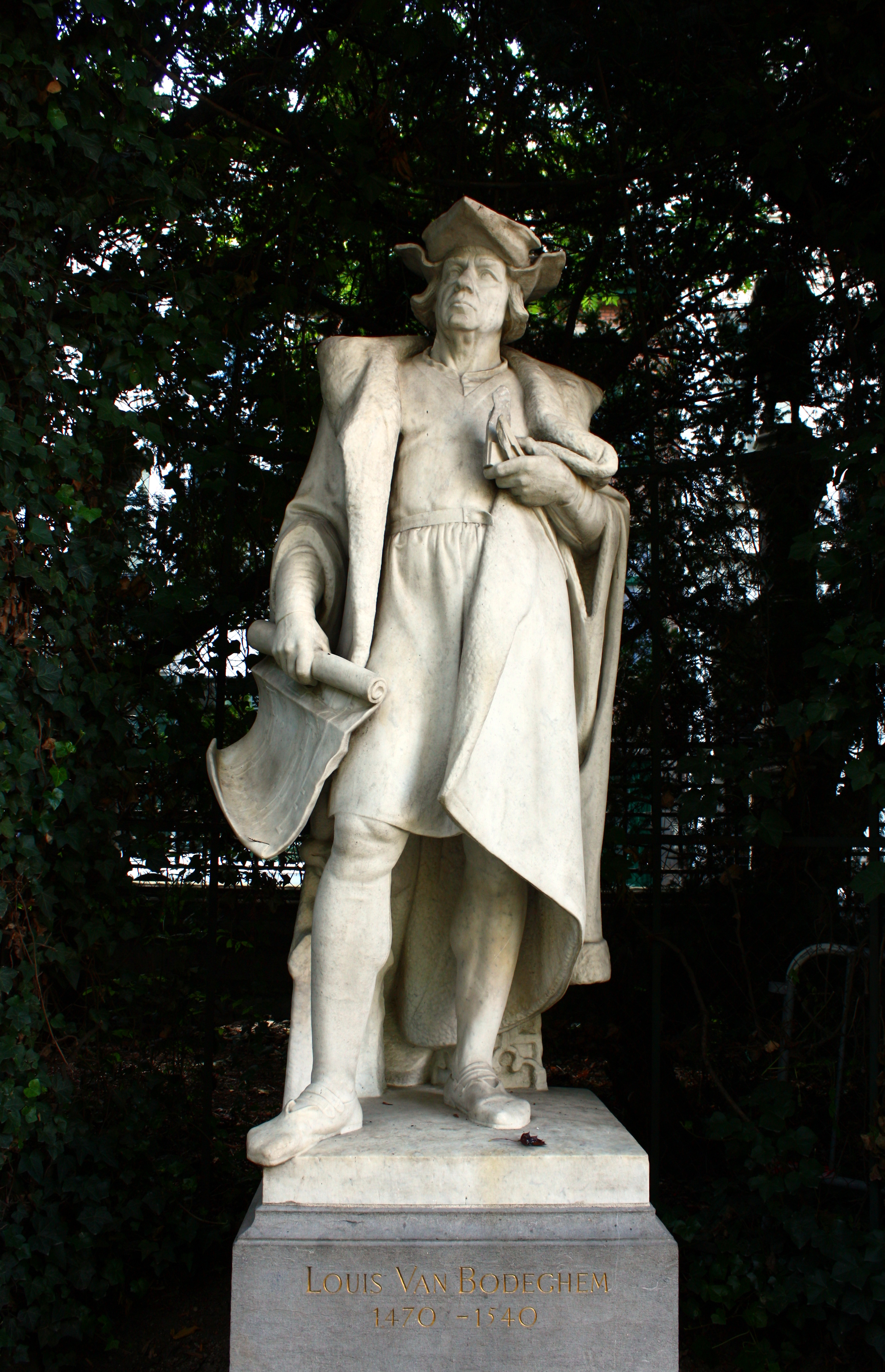 Statue de Louis Van Bodeghem dans le square du Petit Sablon à Bruxelles. Fait partie du lot classé n°2043-0031/0